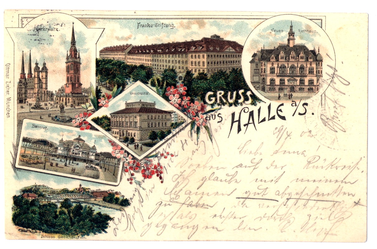 Couleurkarte des Hallenser Wingolf, Motiv Franckesche Stiftungen zu Halle